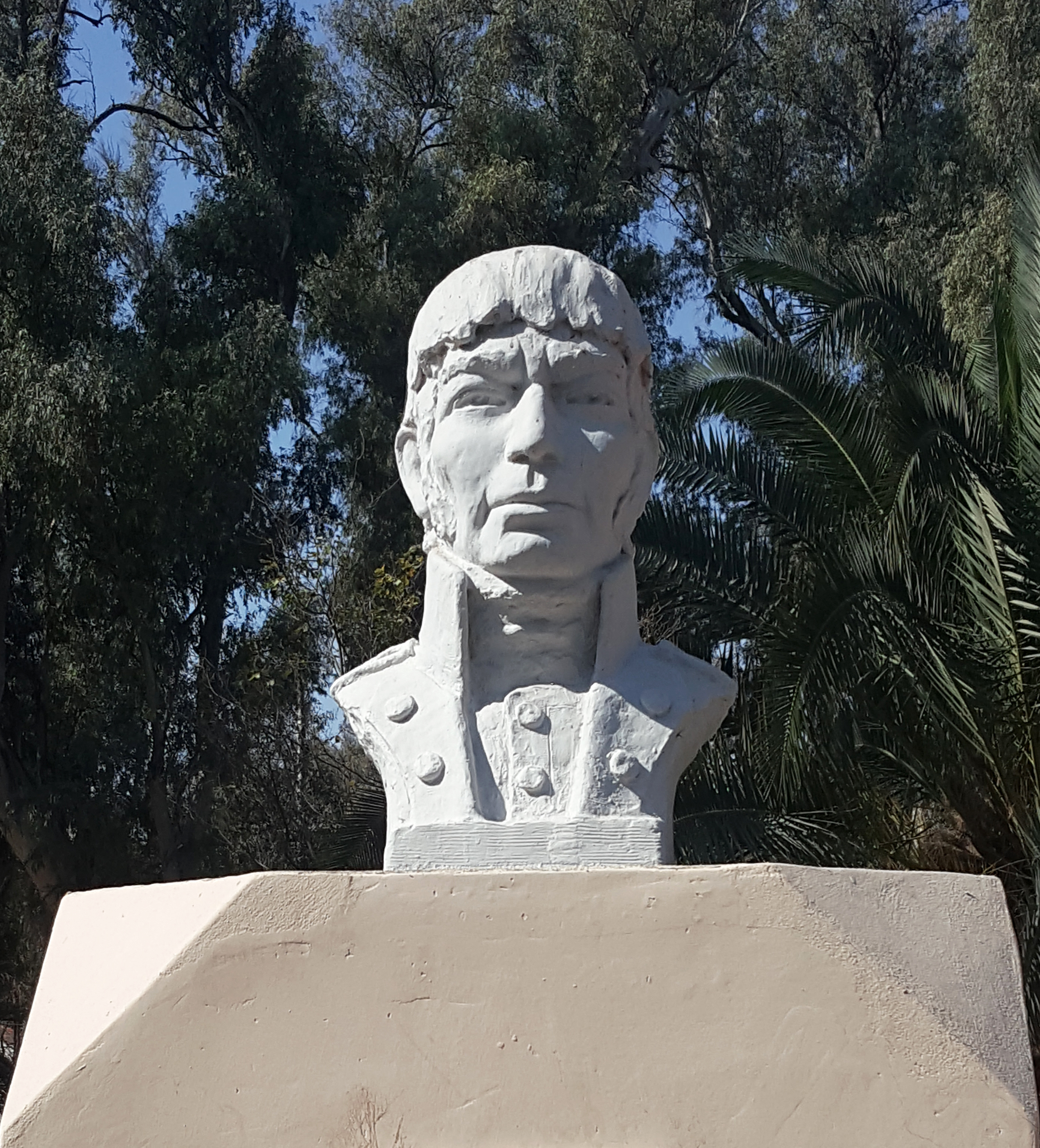 Busto del Coronel Juan Francisco Borges (1766-1817), precursor de la autonomía de la provincia argentina de Santiago del Estero.